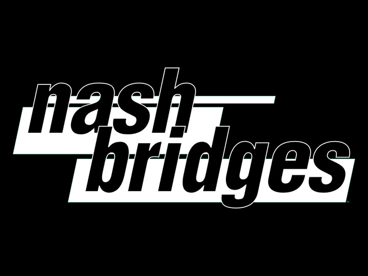 Diese Grafik zeigt das Logo der TV Serie Nash Bridges